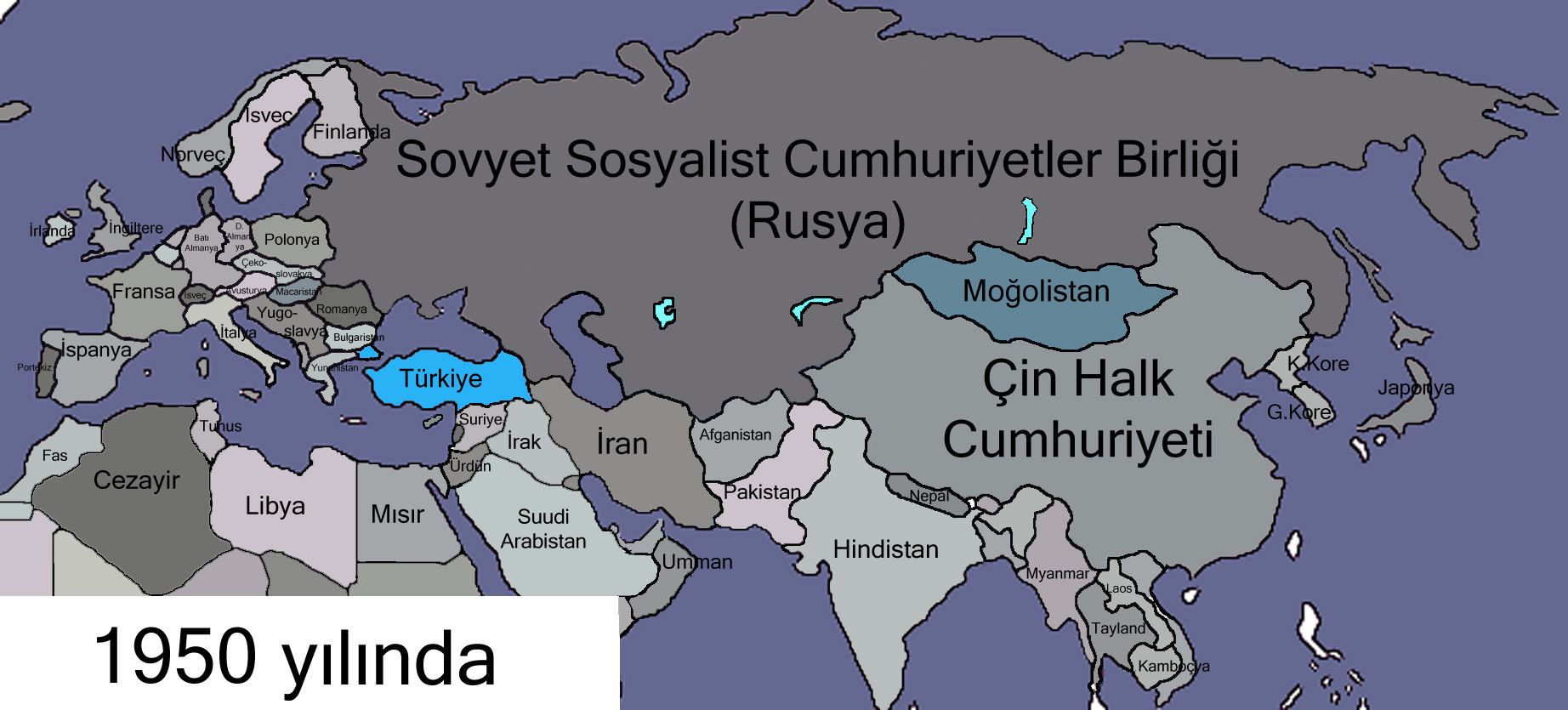 1950 yılında Türk devletlerine dair bir harita.